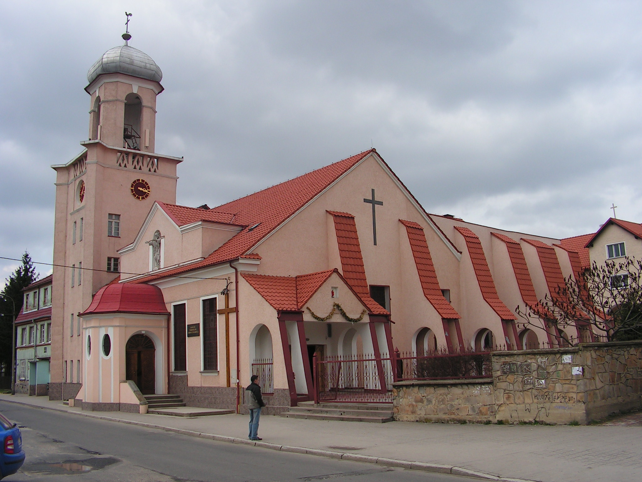 Dzierżoniów, kościół parafii Chrystusa Króla